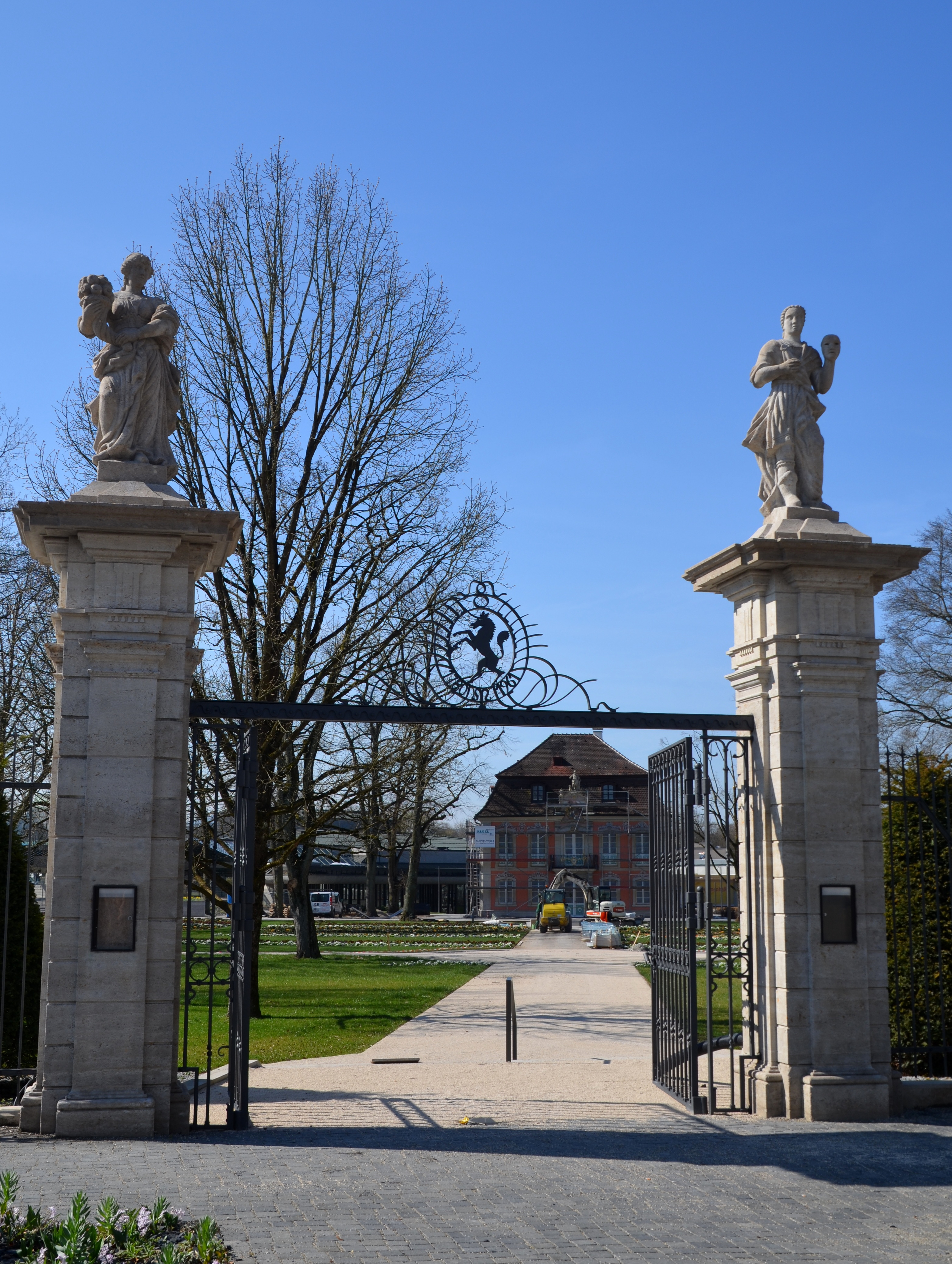 Eingangstor Stadtgarten Schwäbisch Gmünd mit Figuren von Fehrle